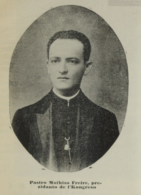 Foto de la pastro Mathias da SILVA FREIRE